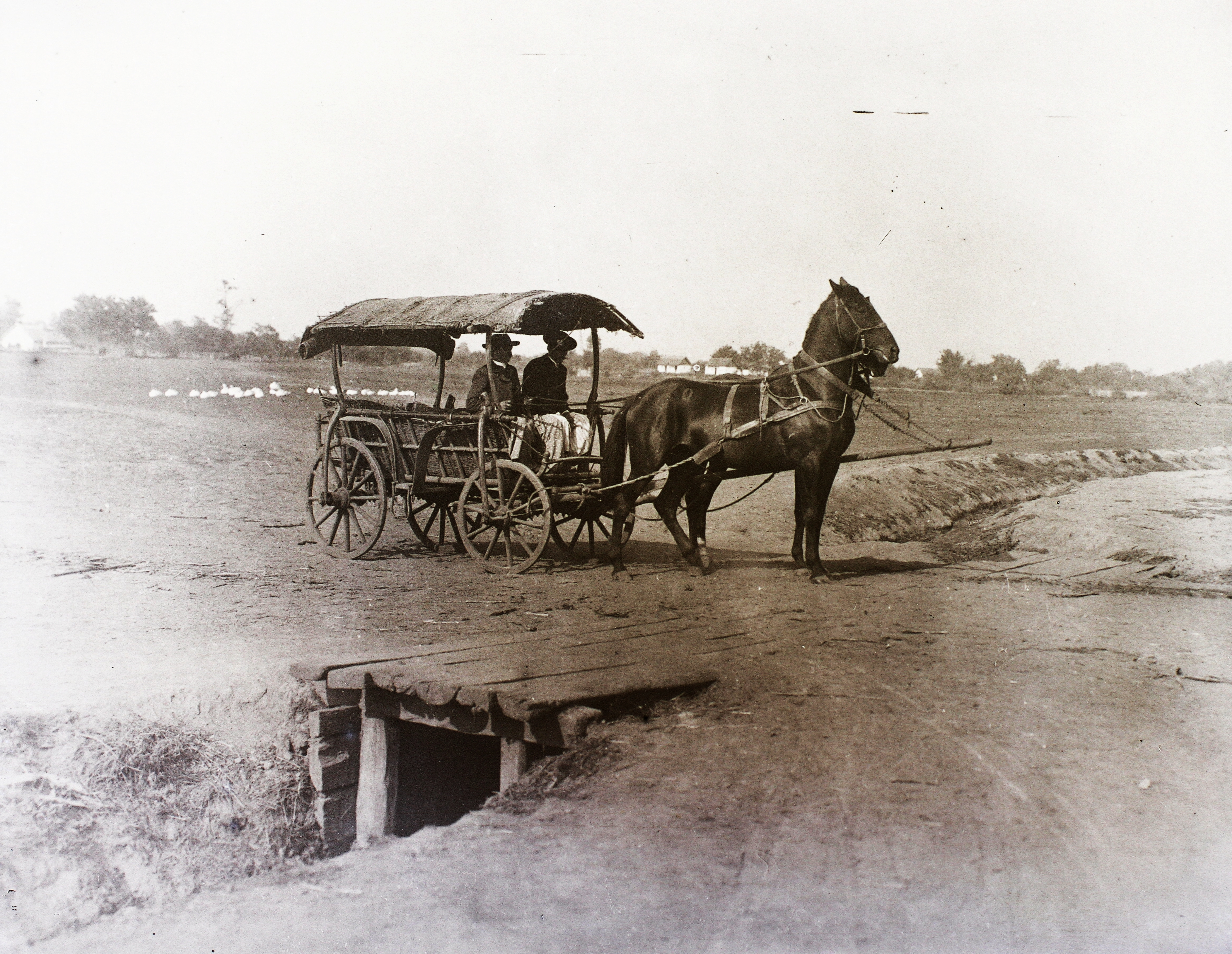 ekhós szekér a város környékén. Location: Hungary, Hajdúszoboszló Tags: chariot, Horse-drawn carriage Title: ekhós szekér a város környékén.